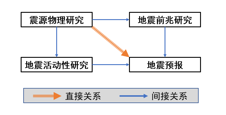 震源研究与其他研究关系